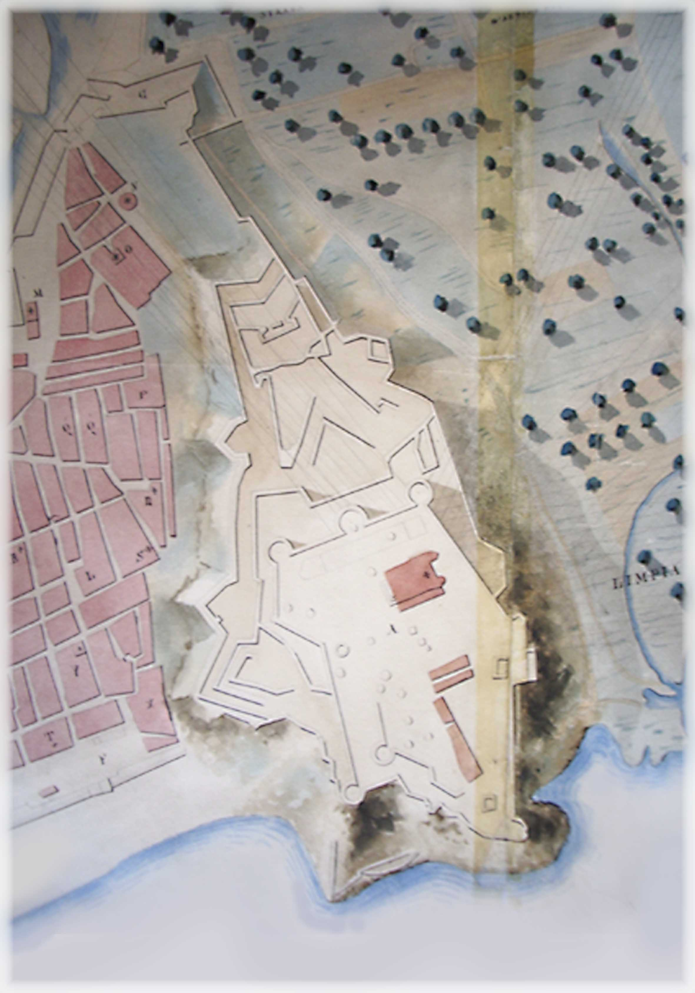 Plan de la ville haute niçoise au tout début du XVIIIe siècle. Détails d'un plan dit de Berwick.